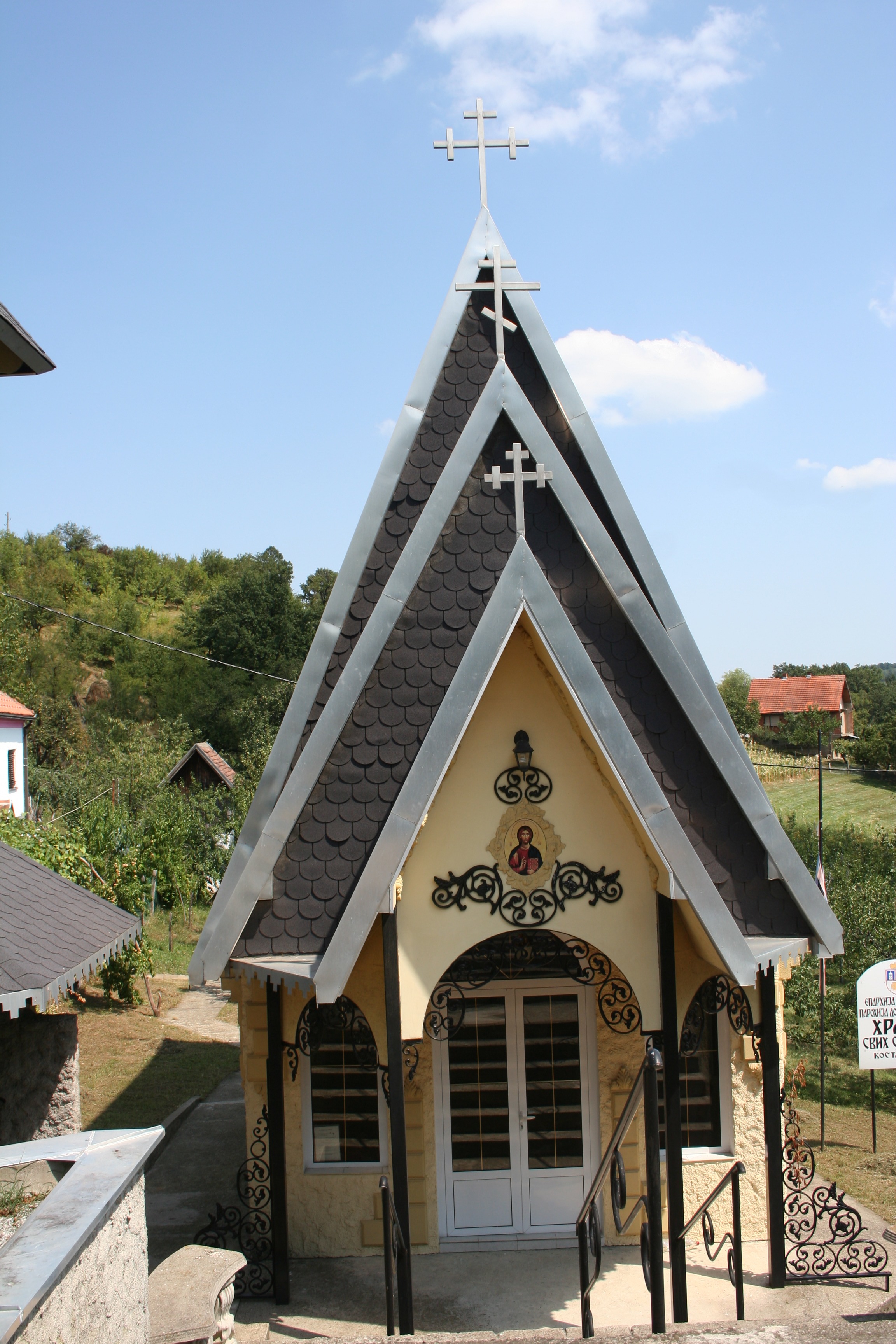 Crkva svih Svetih, Kostajnik